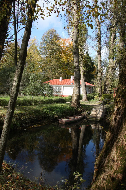 парк с прудом